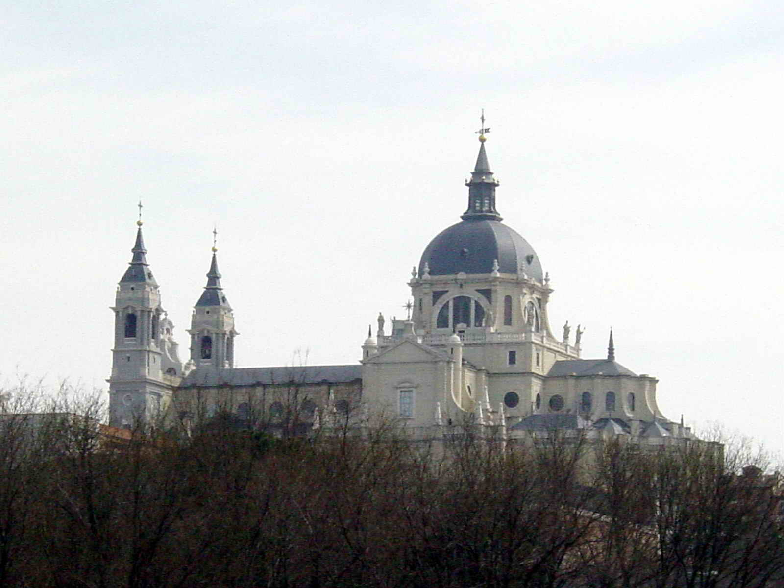 Madrid - Spain